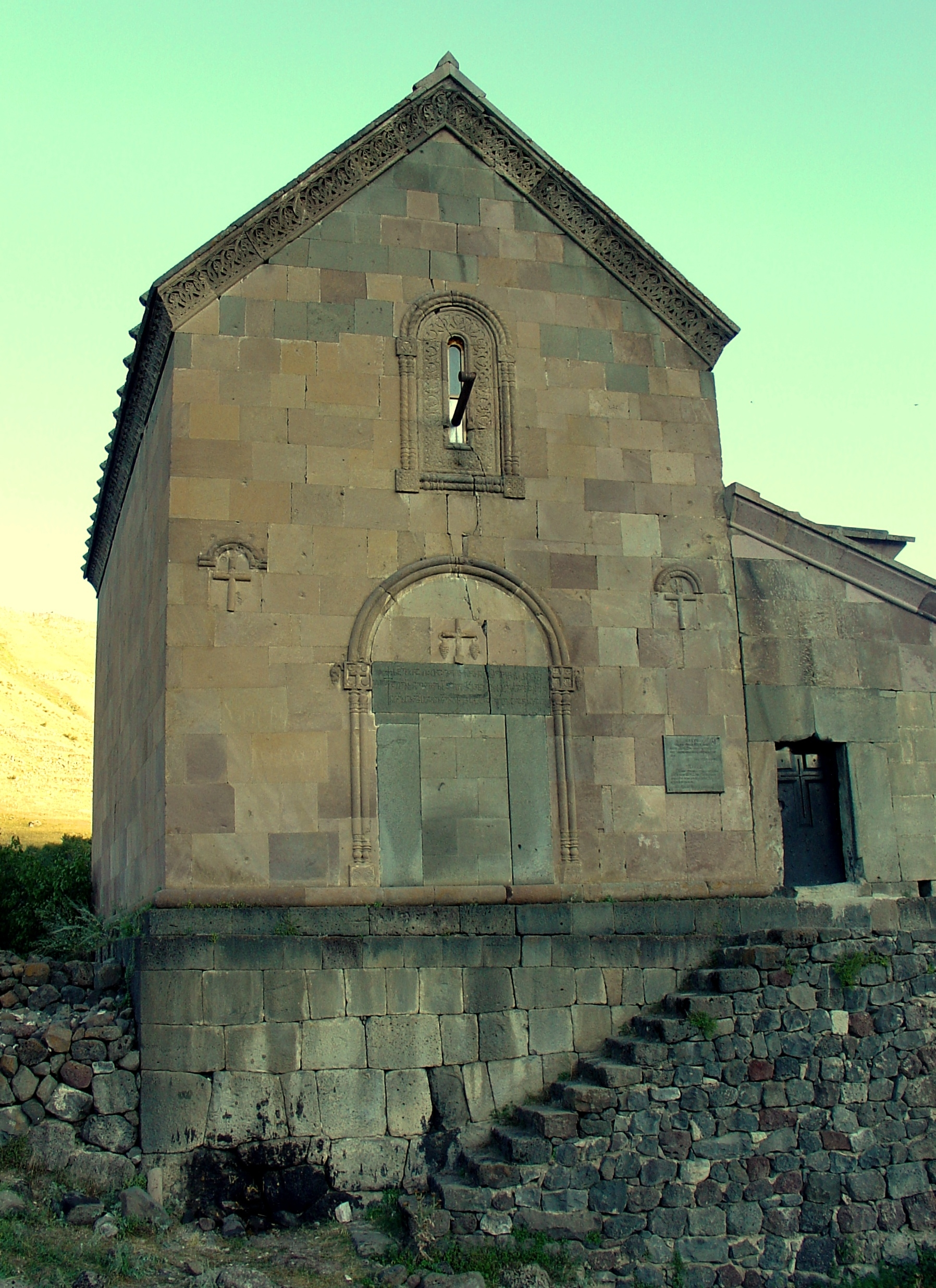 წუნდა. დასავლეთ ფასადი. ავტორის ფოტო